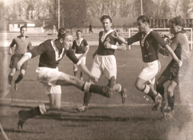 Dürr, Hans 1952